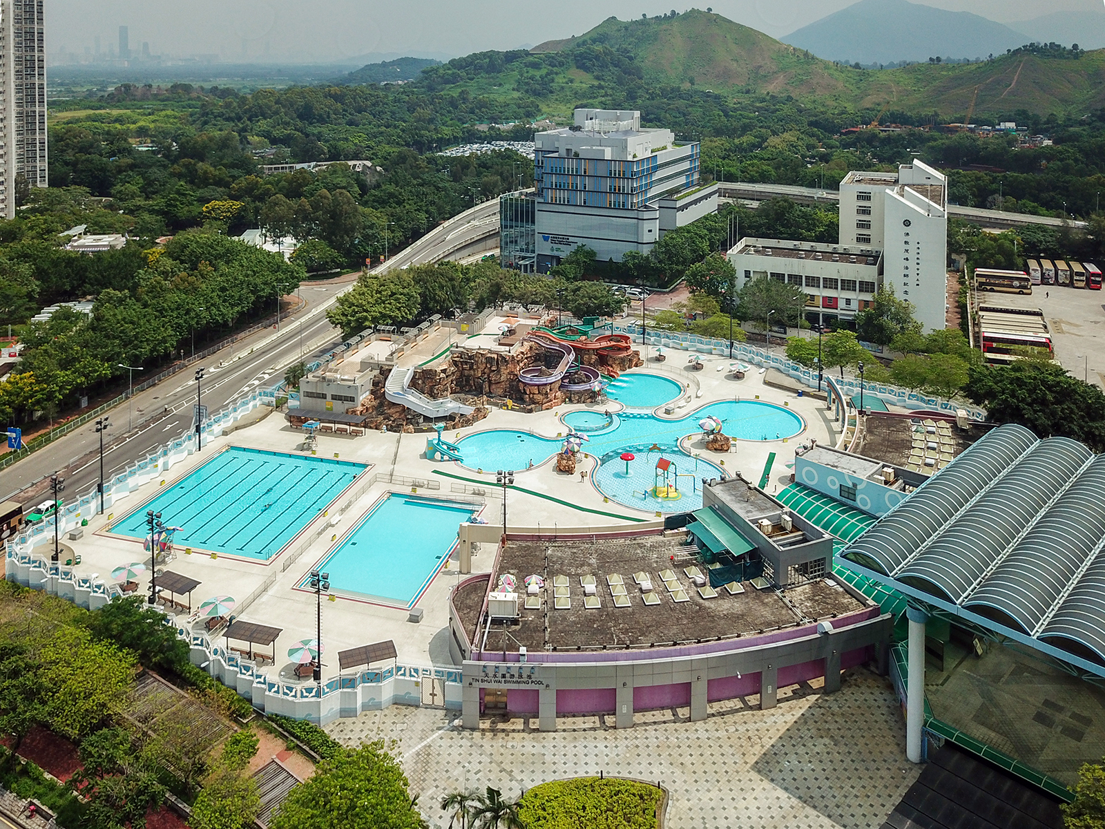 Tin Shui Wai Swimming Pool